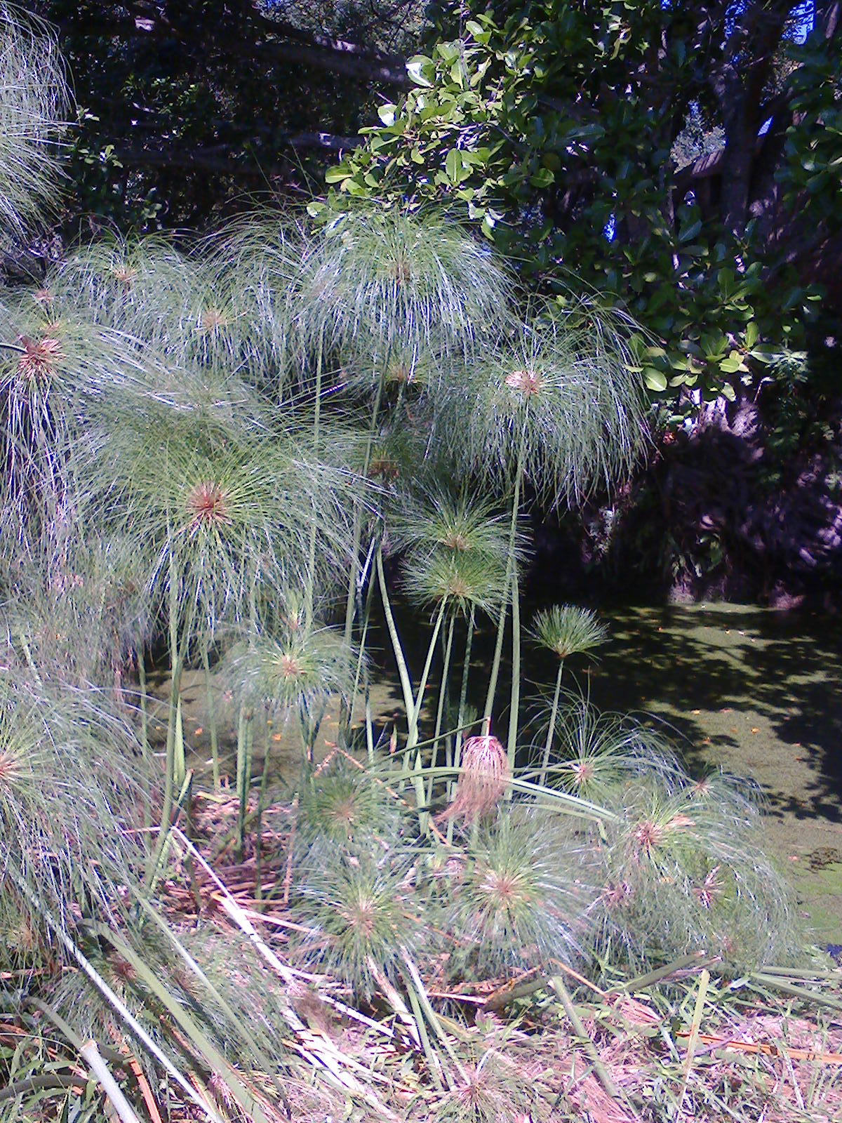 Situado no Parque Penhasco Dois Irmãos-RJ